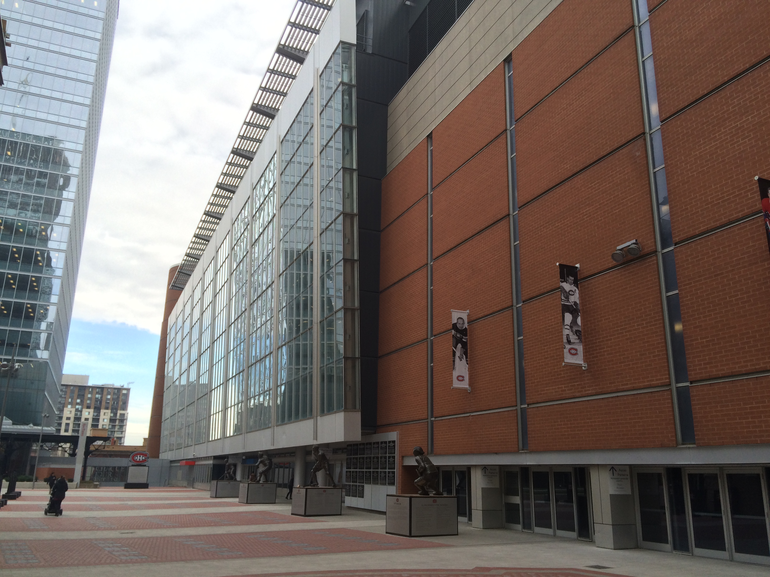 Centre Bell